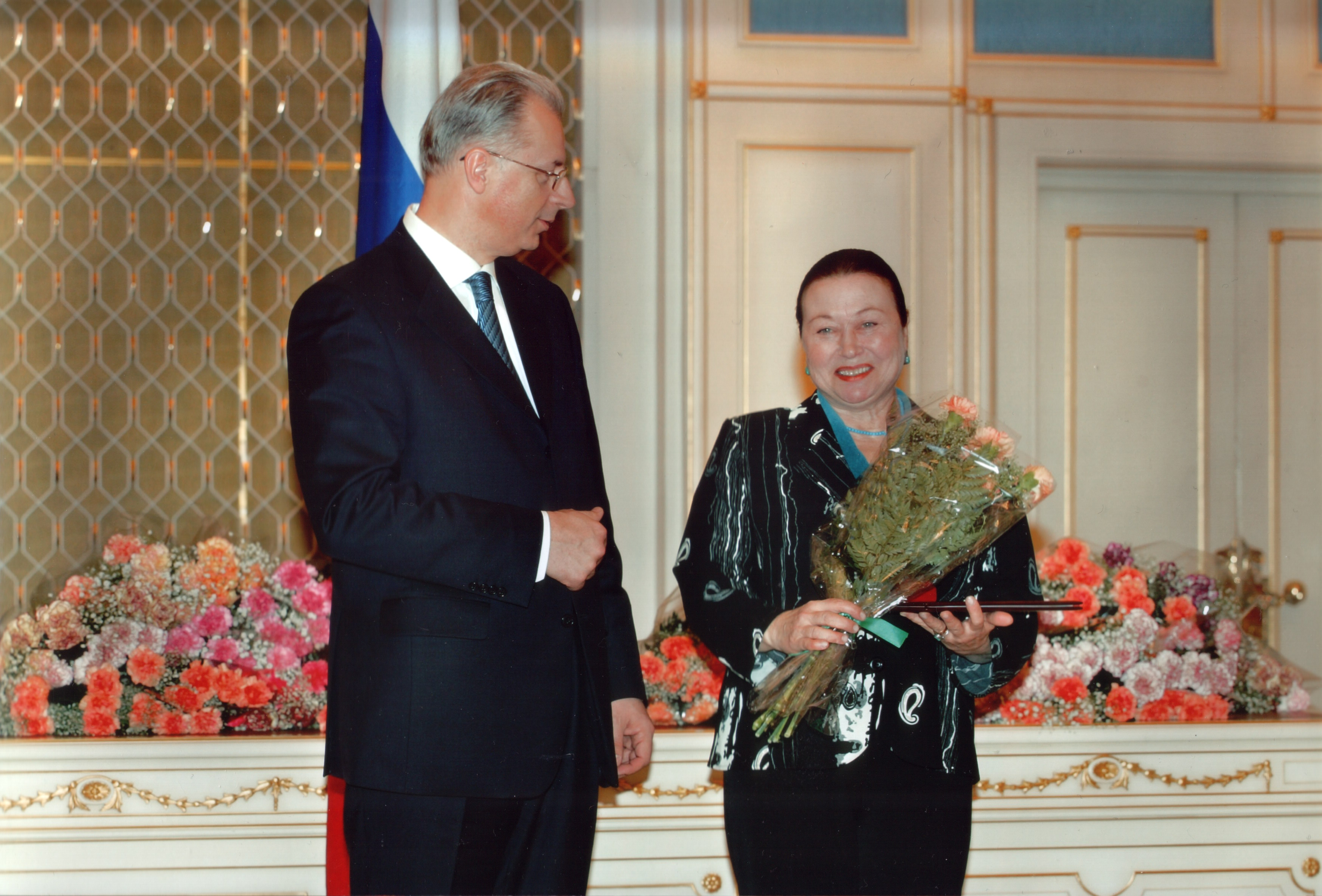 Вручение Премии Правительства РФ в облсти образования Конышевой Н.М. Премию вручает заместитель министра образования и науки РФ Свинаренко Андрей Геннадьевич